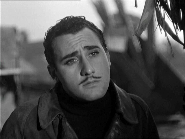 Screenshot del film Sotto il sole di Roma (1948).